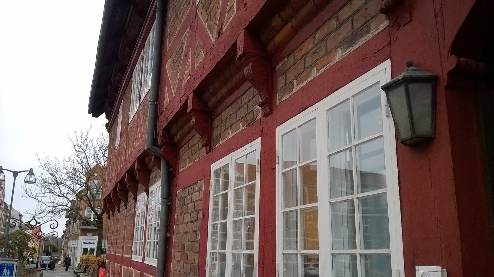 Facaden ud mod kirkepladsen.